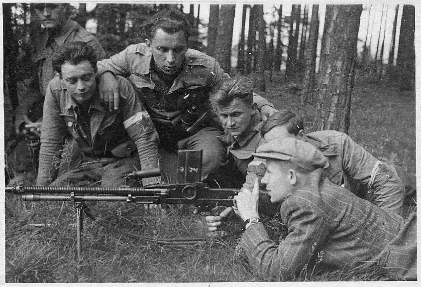 Výcvik s kulometem, v pruhovaném saku je Vasil Kiš (* 17. listopadu 1920, Poroškovo, Podkarpatská Rus)